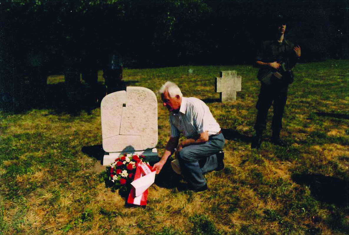 Friedhof des ehem. Kriegsgefangenenlagers Stalag XVII A Kaisersteinbruch, für die slowakischen Soldaten wurde damals kein Gedenkstein aufgestellt. Durch die Initiativen von Klara Köttner-Benigni, Walter Benigni und Helmuth Furch vom Museums- und Kulturverein Kaisersteinbruch gestaltete der slowakische Bildhauer Peter Roller den "Slowaken"-Stein. Vor diesem kniet der slowakische Schriftsteller Ladislav Ťažký, ehem. Gefangener in diesem Lager.